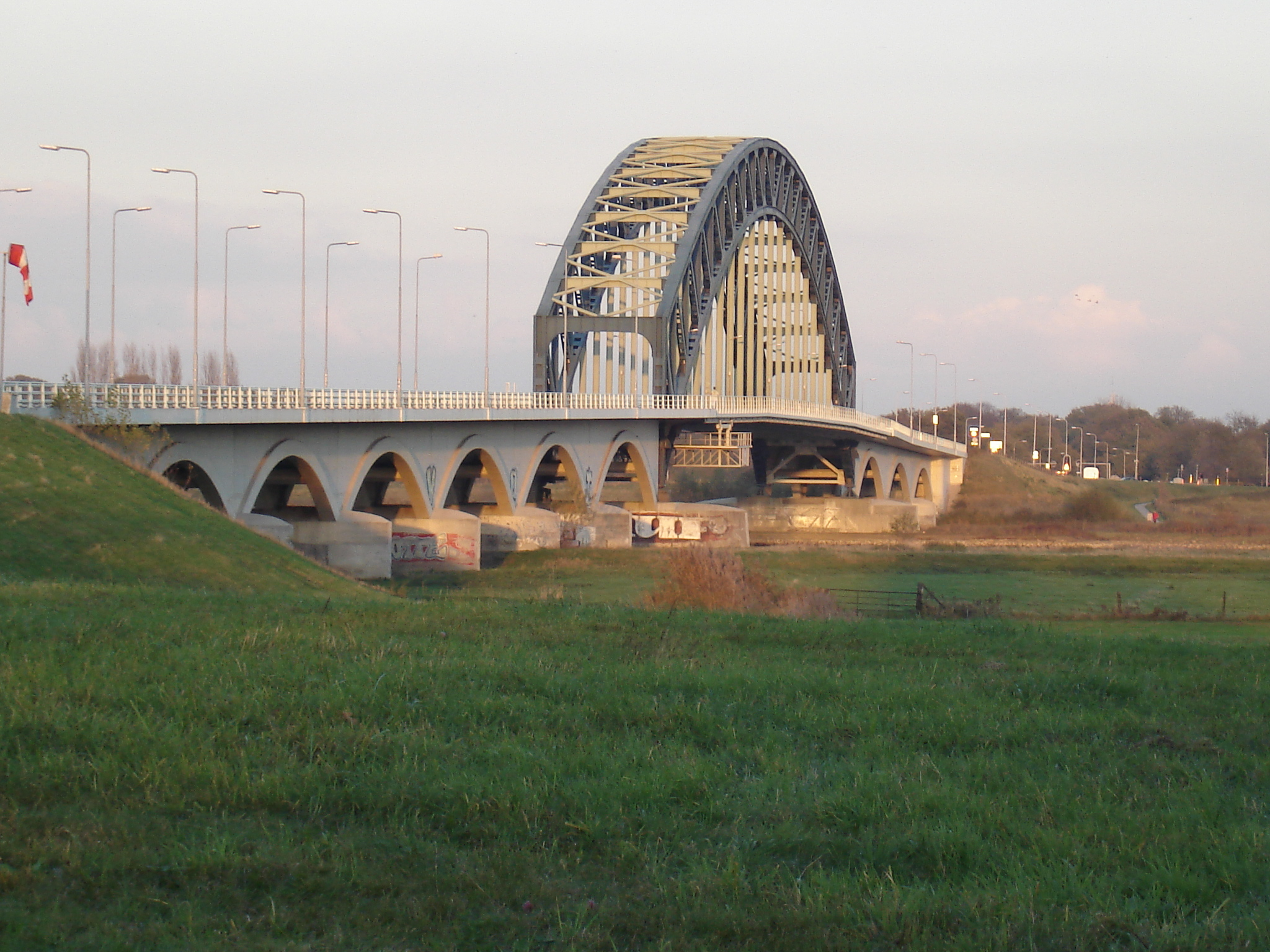 Omschrijving